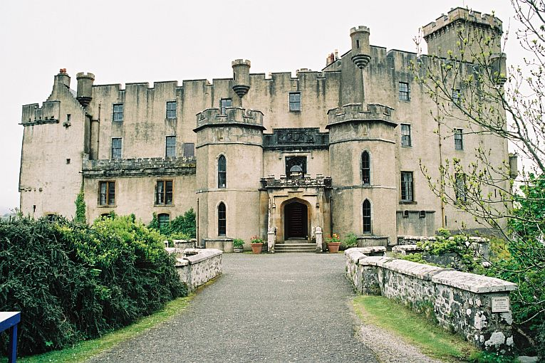 Dunvegan inmitten eines Parks.